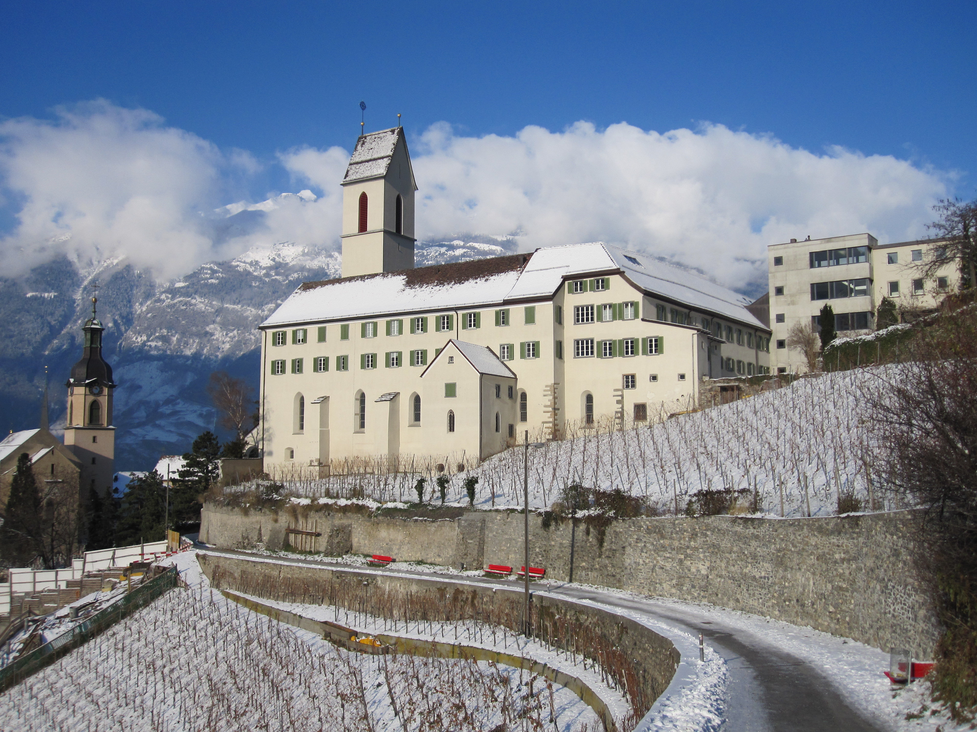 St. Luzikirche in Chur (links Kathedrale, rechts Bündner Kantonsschule)